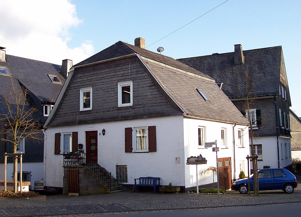 Ältestes Haus in der Schmallenberger Kernstadt (Germany), Anno 1639